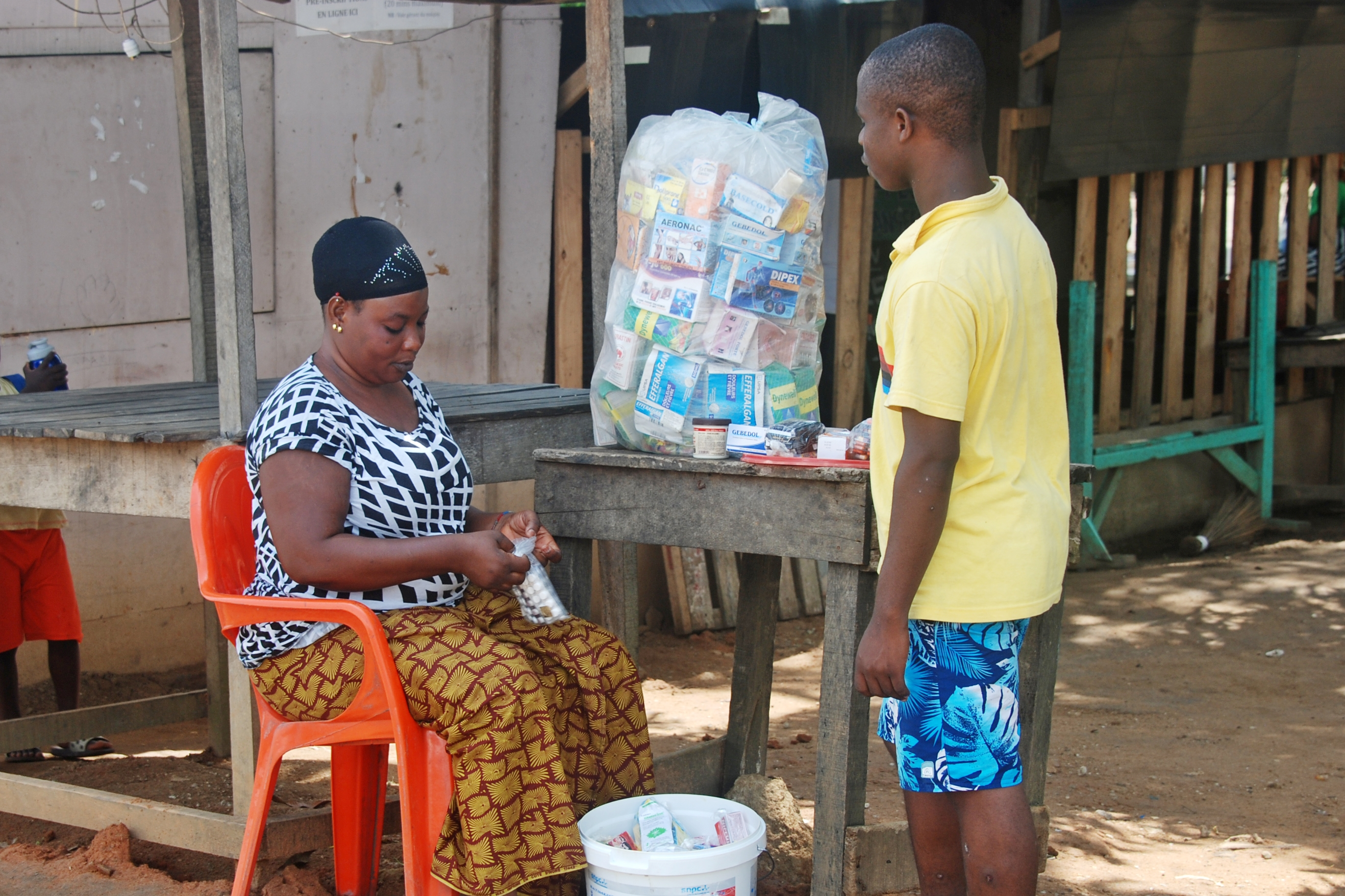 vendeuse de médicaments pharmaceutiques dans les rues d'Abidjan This is an image of "African people at work" from Ivory Coast